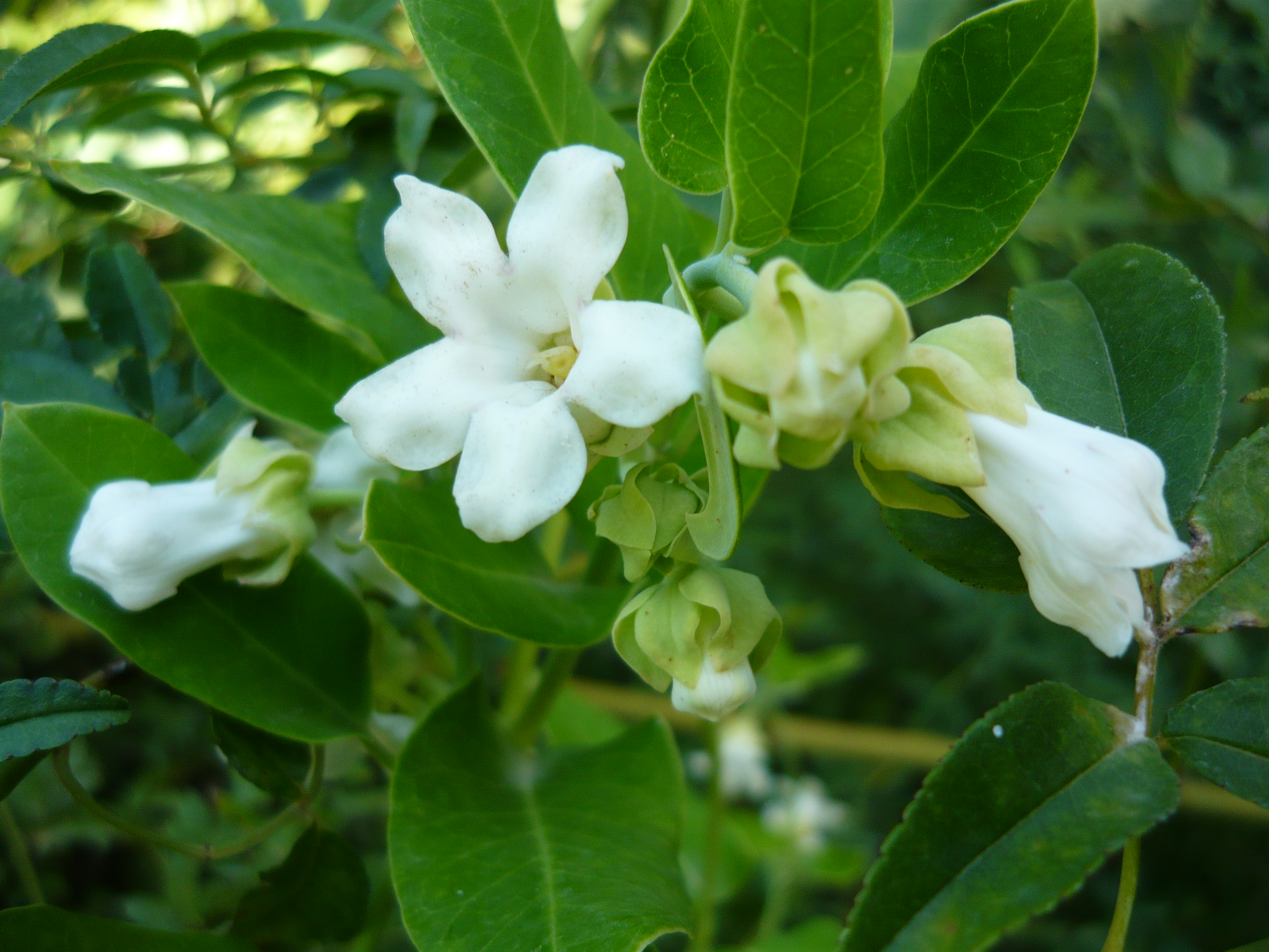 Araujia sericifera. Real Jardín Botánico de Madrid